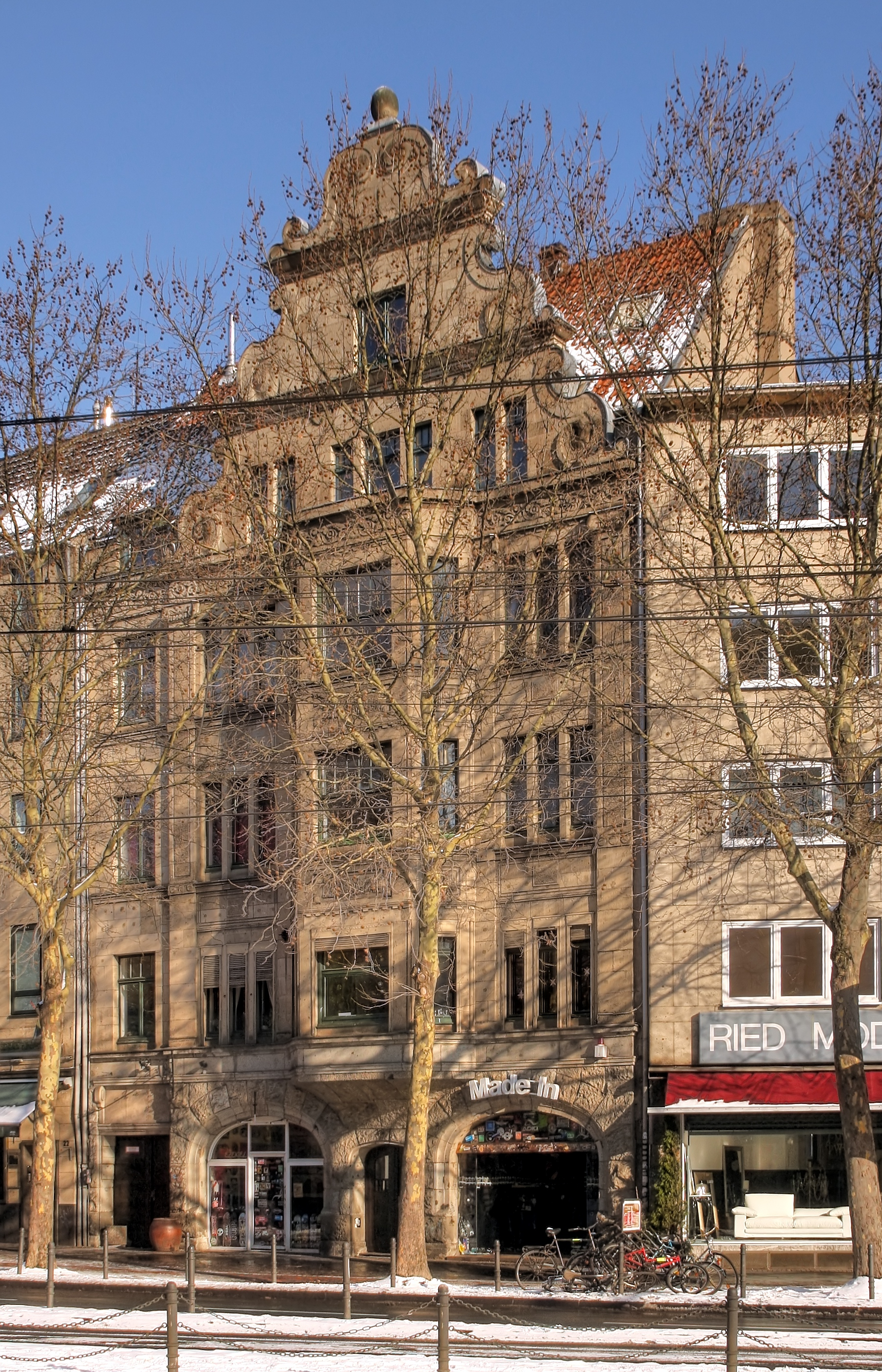 Wohn- und Geschäftshaus, Hahnenstraße 20, Köln. Baujahr: um 1910